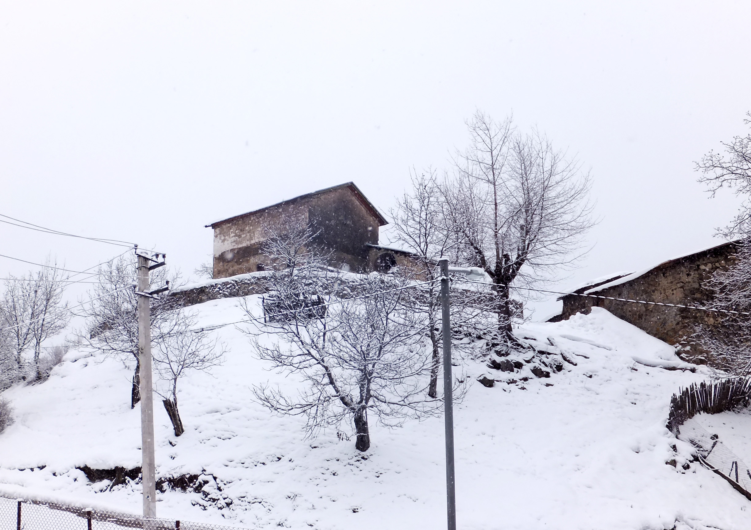 მაცხოვრის ეკლესია „მაცხვარ“